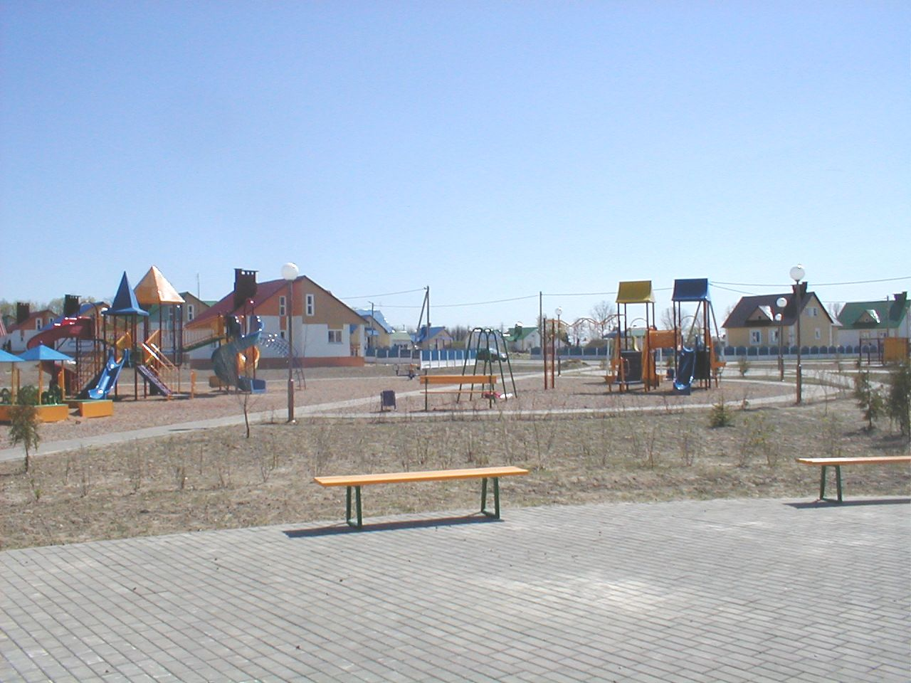 Агрогородок. Площадка для детей.